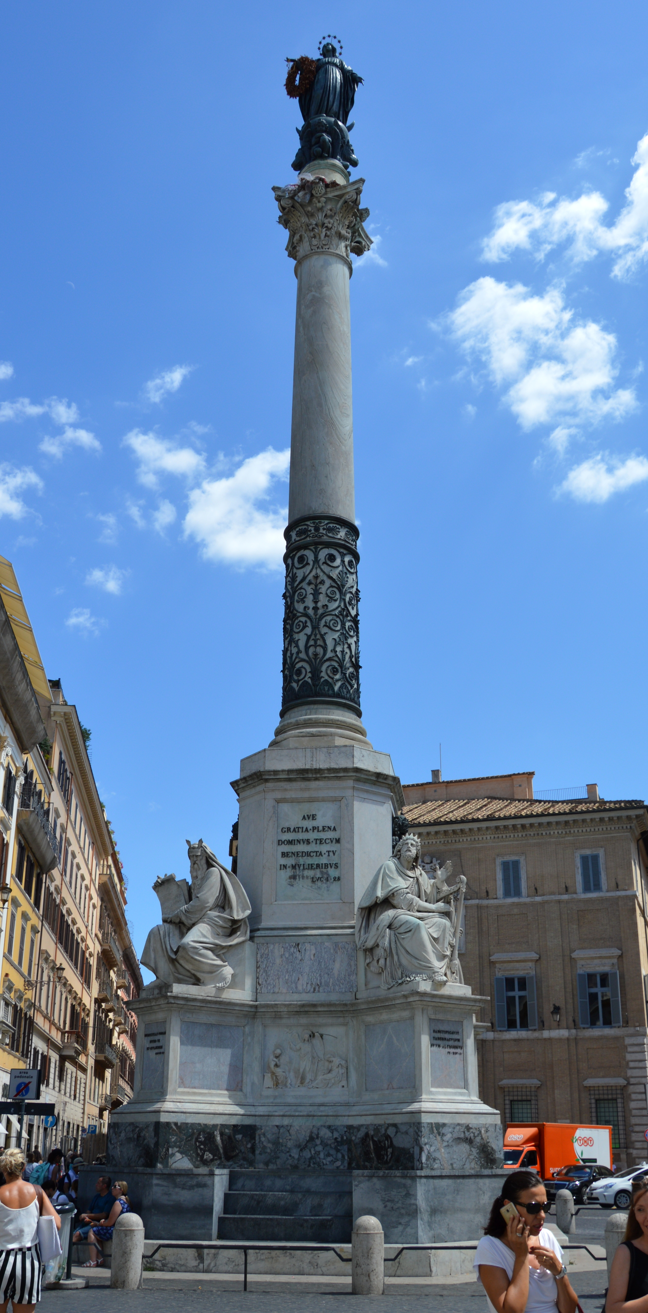 Colonna dell'Immacolata 2018